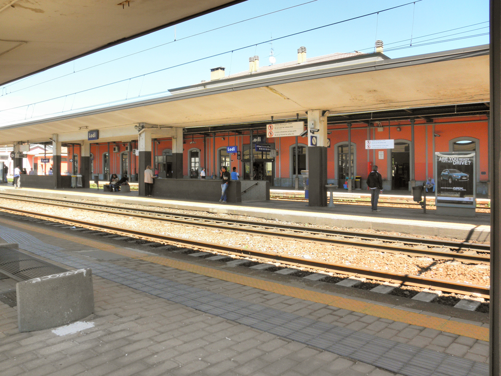 Interno della stazione di Lodi